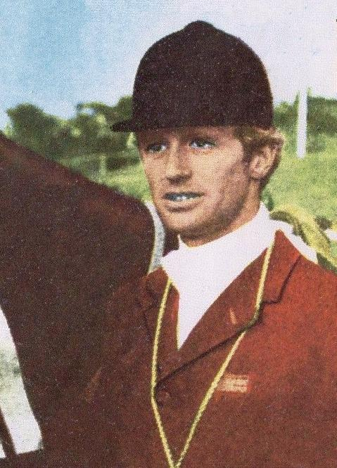 CAMPIONI dello SPORT 1973/74-Figurina n.387- MEADE -GBR-SPORT EQUESTRI-Rec